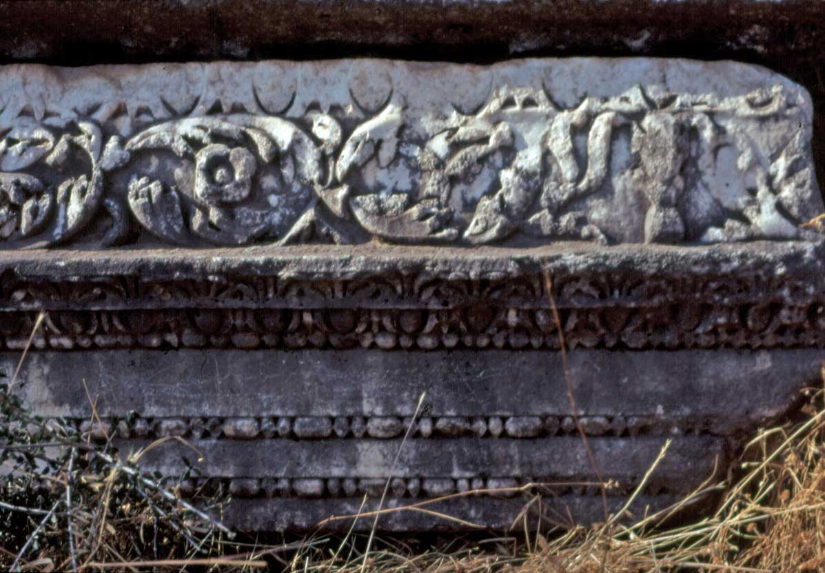 Nysa, bouleuterion riadattato come odeion probabilmente in epoca antonina: fregio-architrave con astragalo a fusarole singole invece che doppie (scopri perchè: )